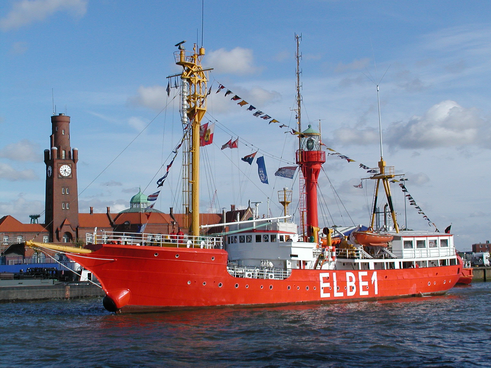 Noch ein Bild der Elbe I